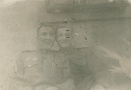 Офицеры 1901 сап. 1944-45 год. Справа командир взвода боепитания Пастухов И.А.